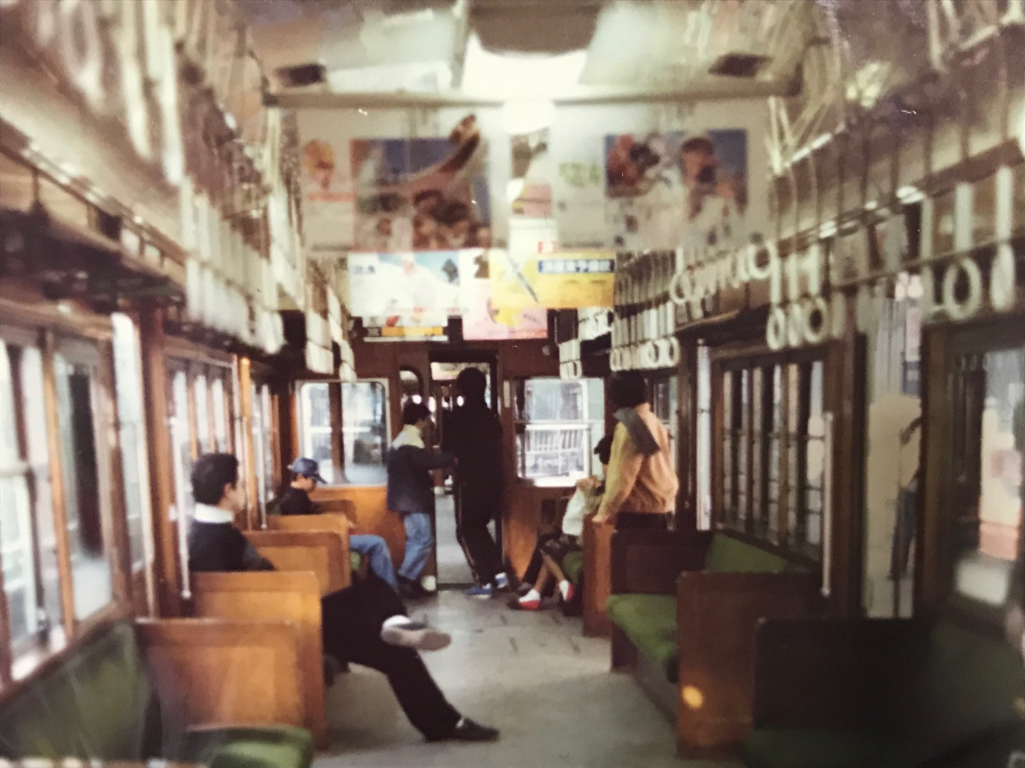 京阪1300系車内